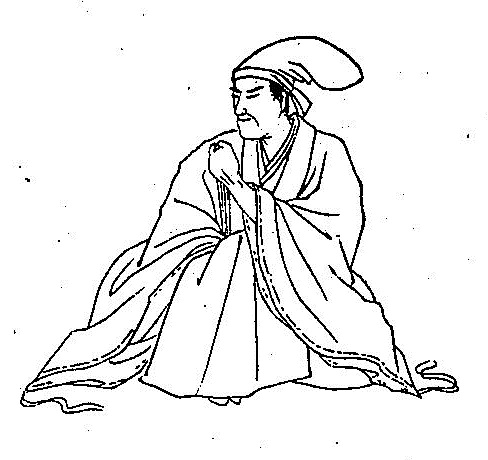 戸田忠至